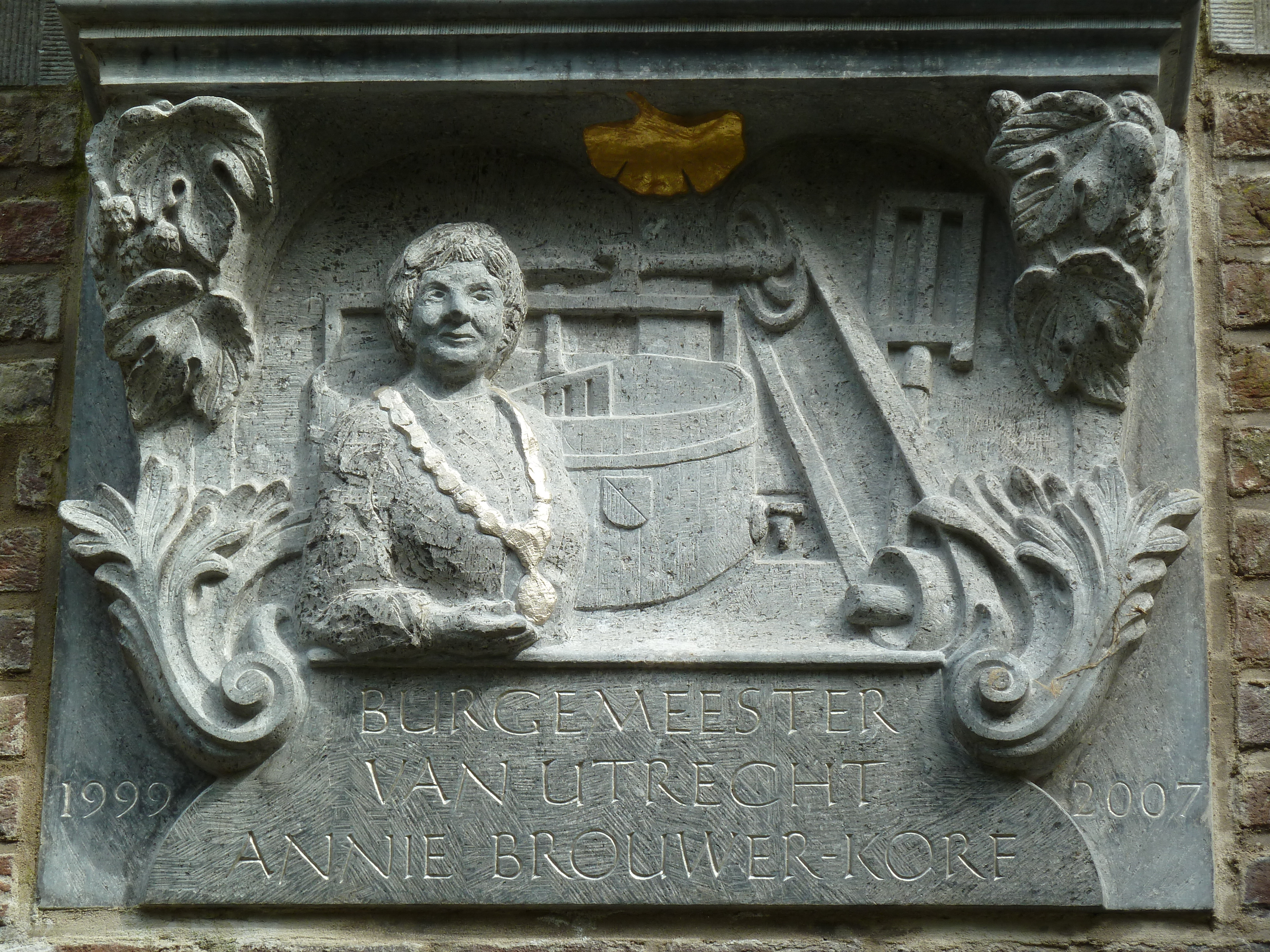 Straatlantaarnconsole bij Oudegracht 328, Utrecht, NL.